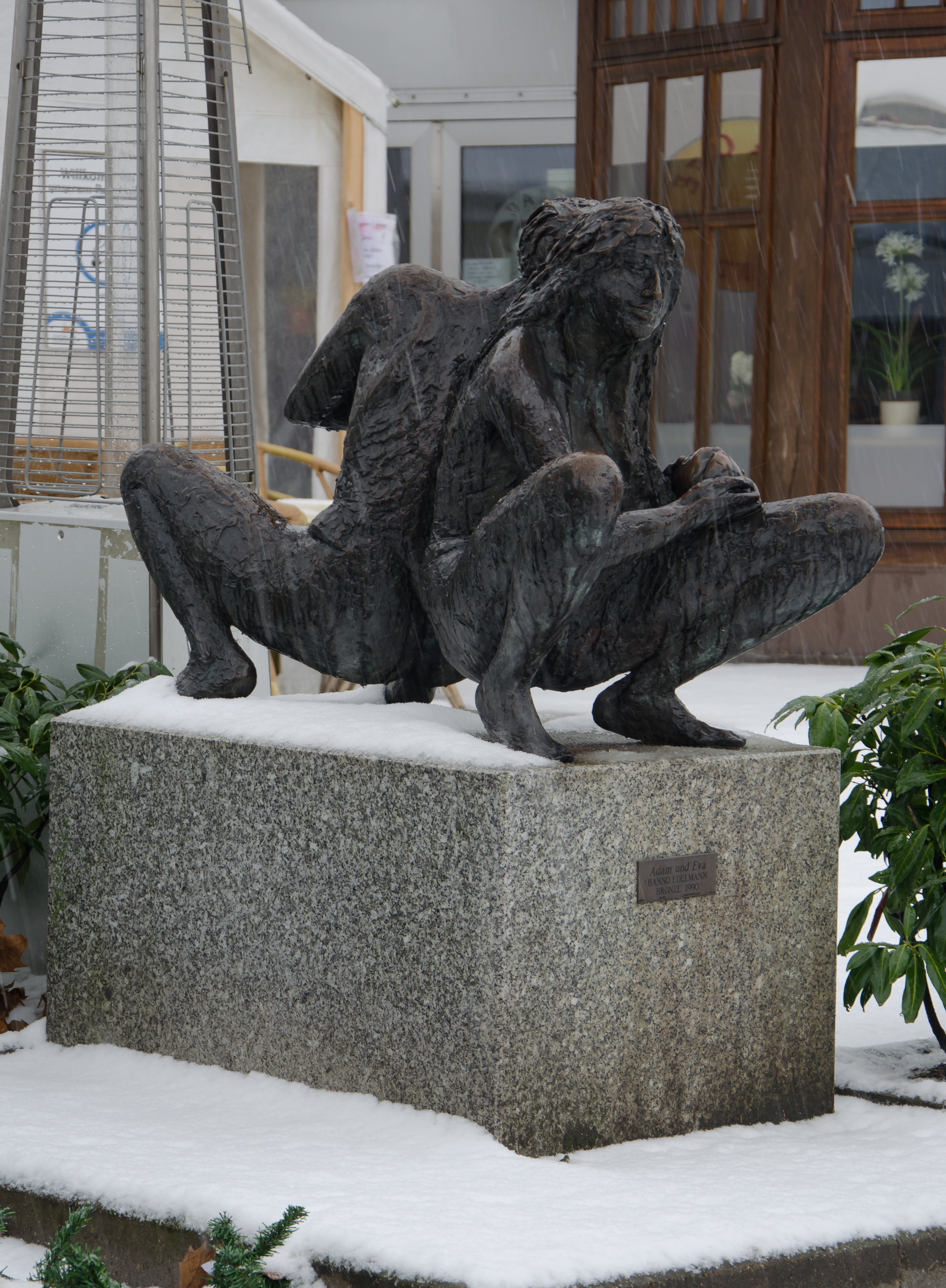 Hanno Edelmann - Adam und Eva, Bronze , 1990